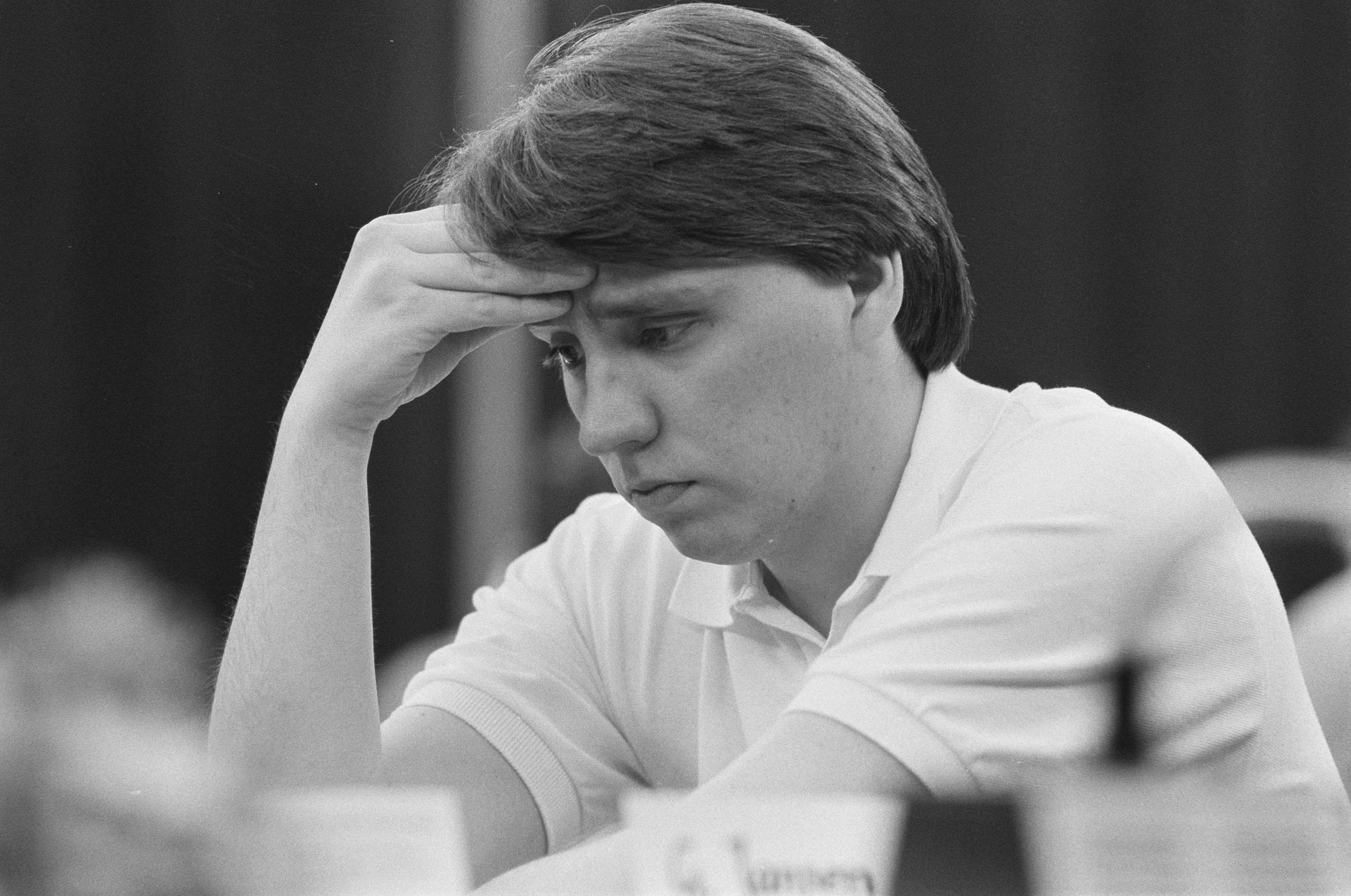 Collectie / Archief : Fotocollectie Anefo Reportage / Serie : [ onbekend ] Beschrijving : NK dammen 3e ronde in Nijverdal; Gerard Jansen , close Datum : 16 april 1987 Locatie : Nijverdal Trefwoorden : DAMMEN Fotograaf : Croes, Rob C. / Anefo Auteursrechthebbende : Nationaal Archief Materiaalsoort : Negatief (zwart/wit) Nummer archiefinventaris : bekijk toegang 2.24.01.05 Bestanddeelnummer : 933-9558